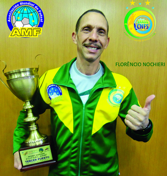 Árbitro brasileiro Florêncio Nochieri da CNFS.